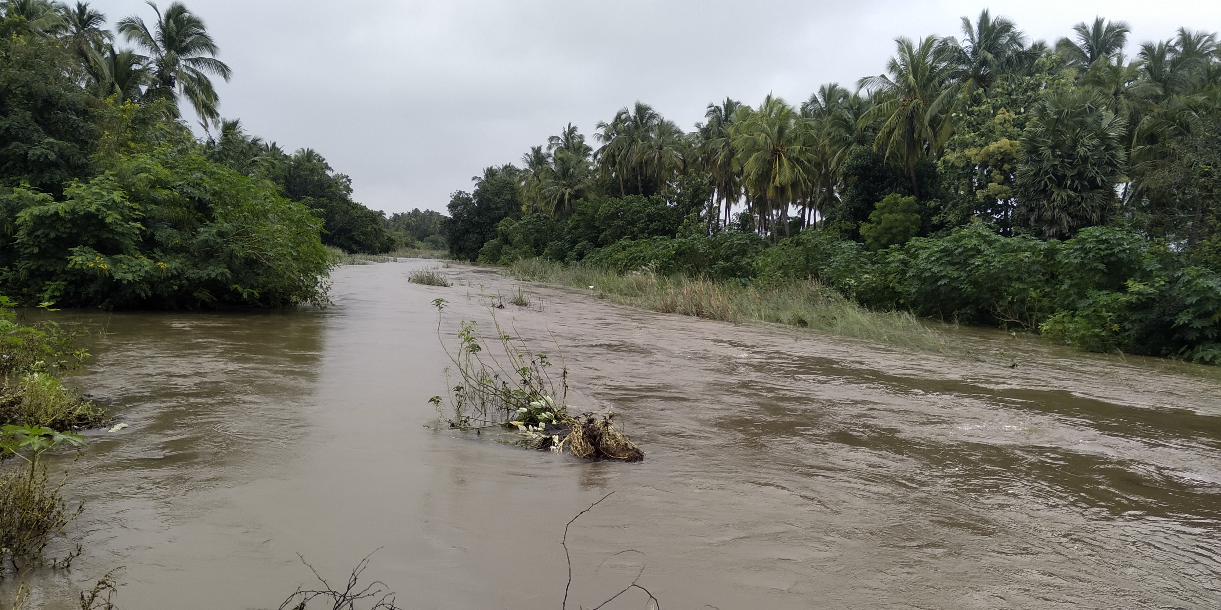 2019 ல் பச்சையாறு